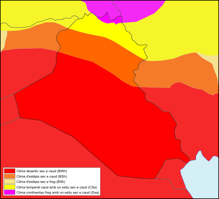 Clima d'Iraq.